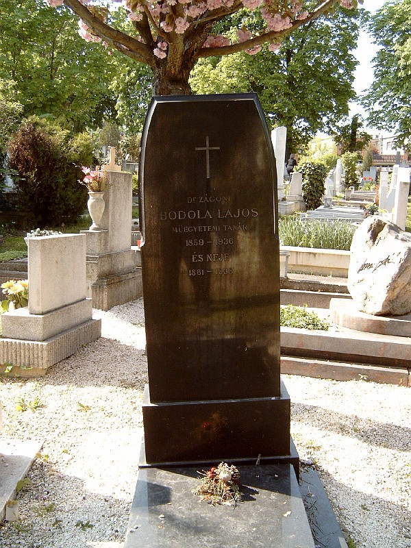 Bodola Lajos (Sampierdarena, Itália, 1859. október 9. – Budapest, 1936. június 28.) mérnök, műegyetemi tanár sírja Budapesten. Farkasréti temető: 5/4-1-3